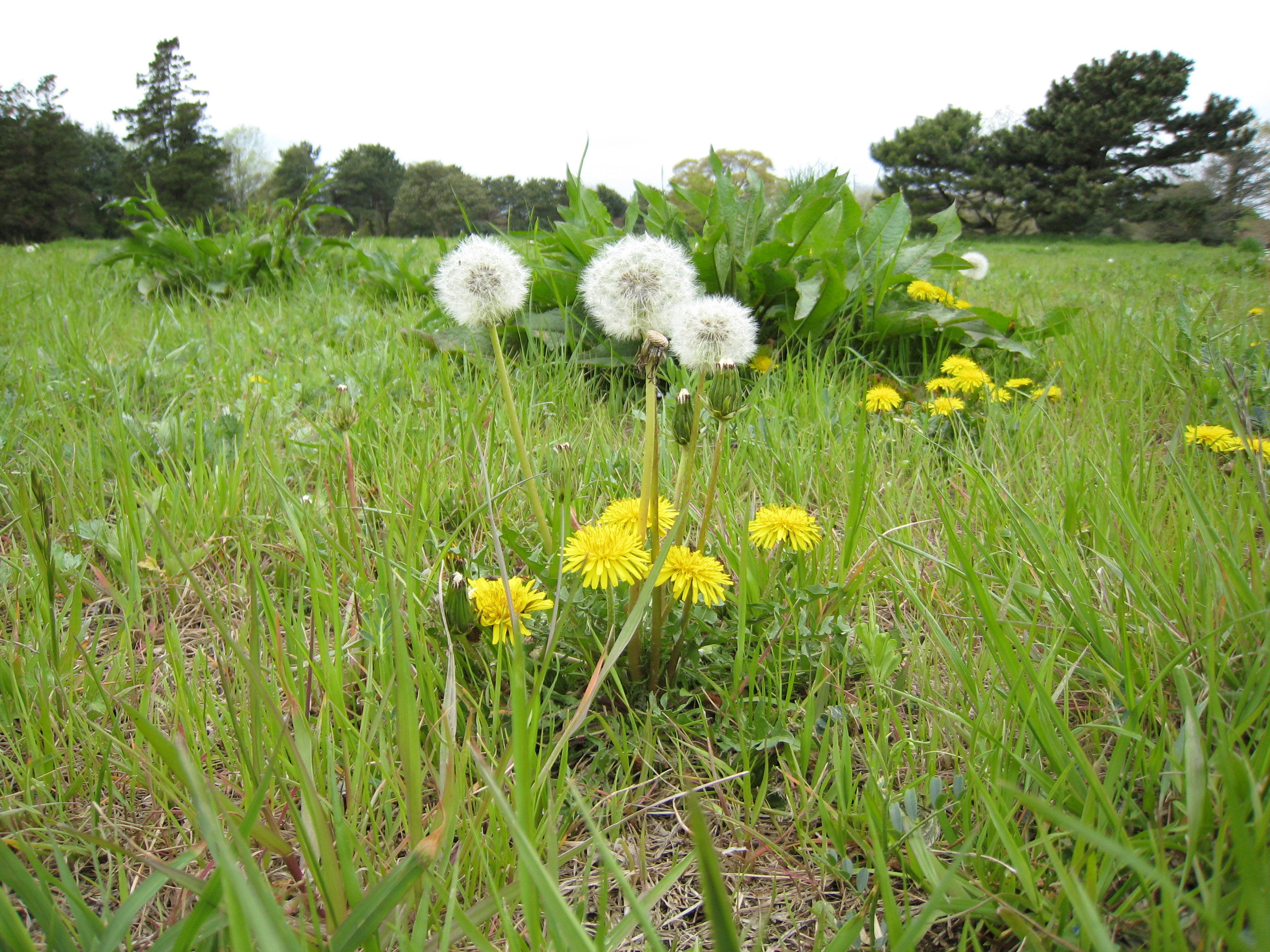 Tanpopo(Dandelion) ,Tatebayashi city,Gunma,Japan